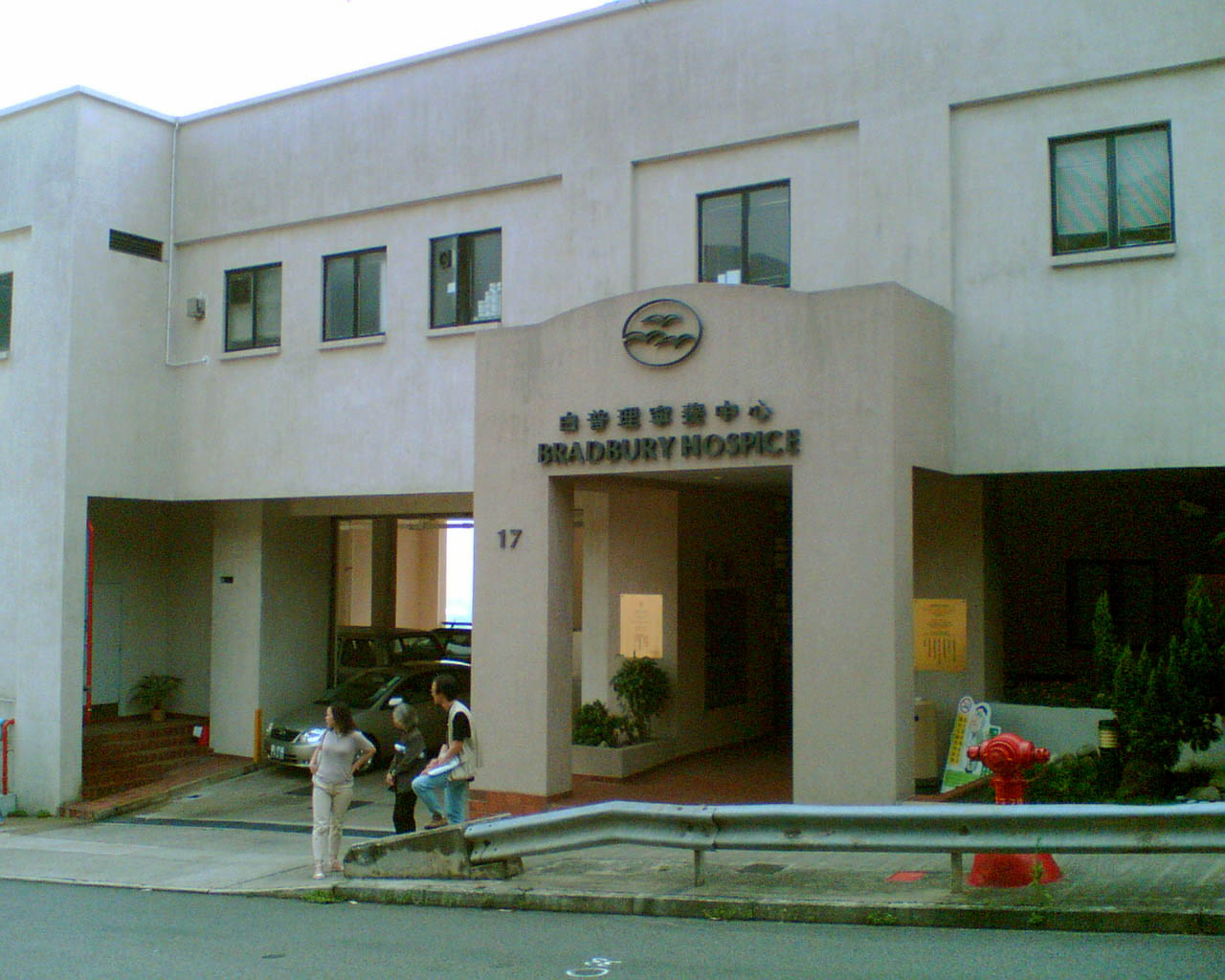 白普理寧養中心